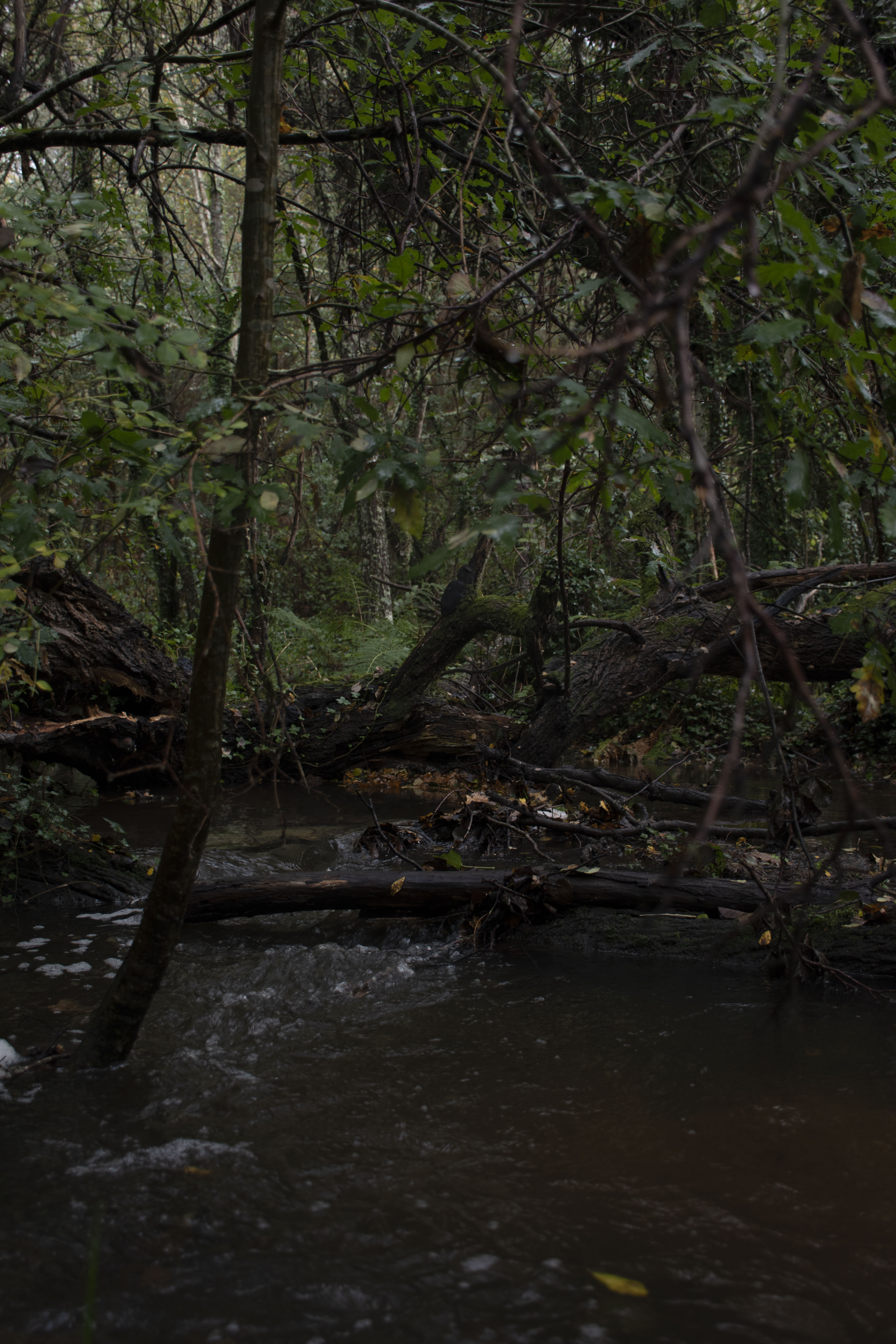 O Regato do Cepelo